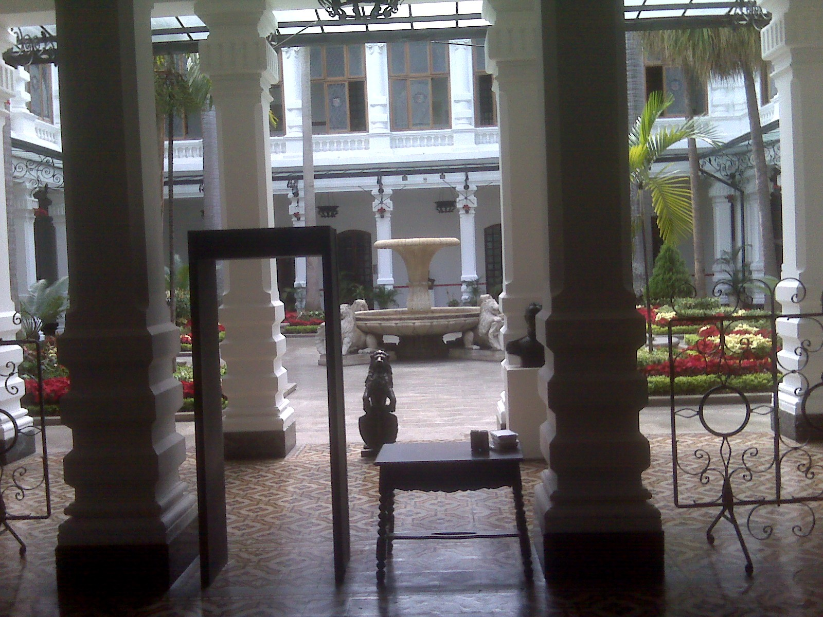 Palacio Municipal de Caracas, en el centro historico de Caracas, Municipio Libertador, Distrito Capital - Venezuela